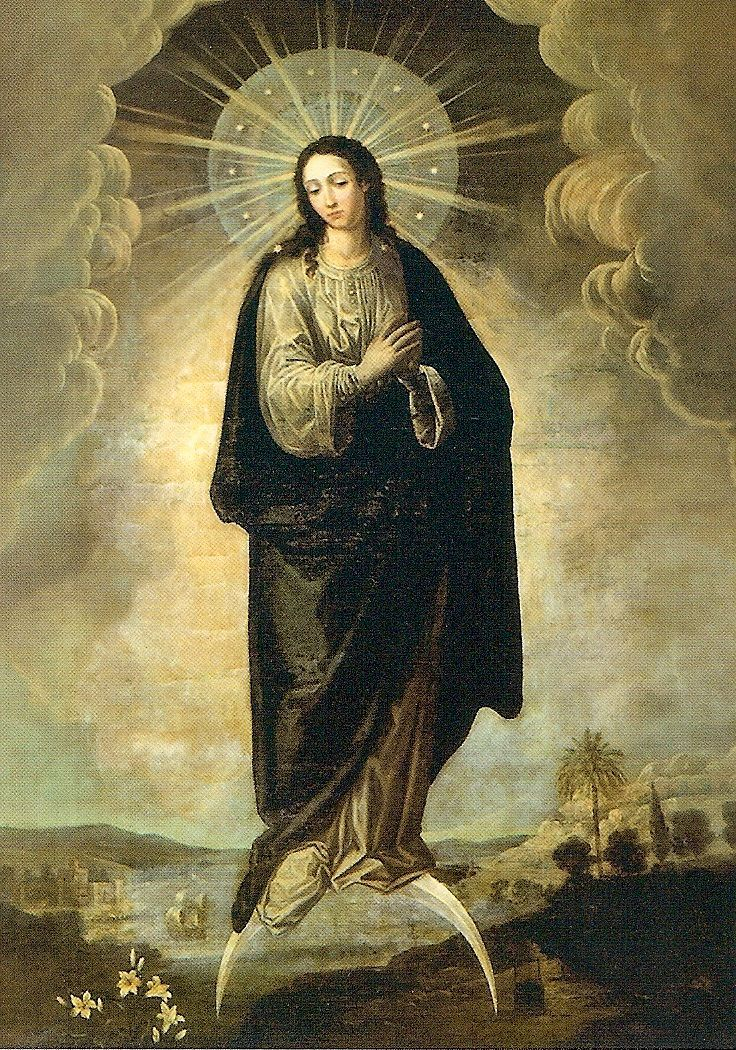 Inmaculada. Escuela de Pacheco (s. XVII). Capilla del Seminario San Pelagio